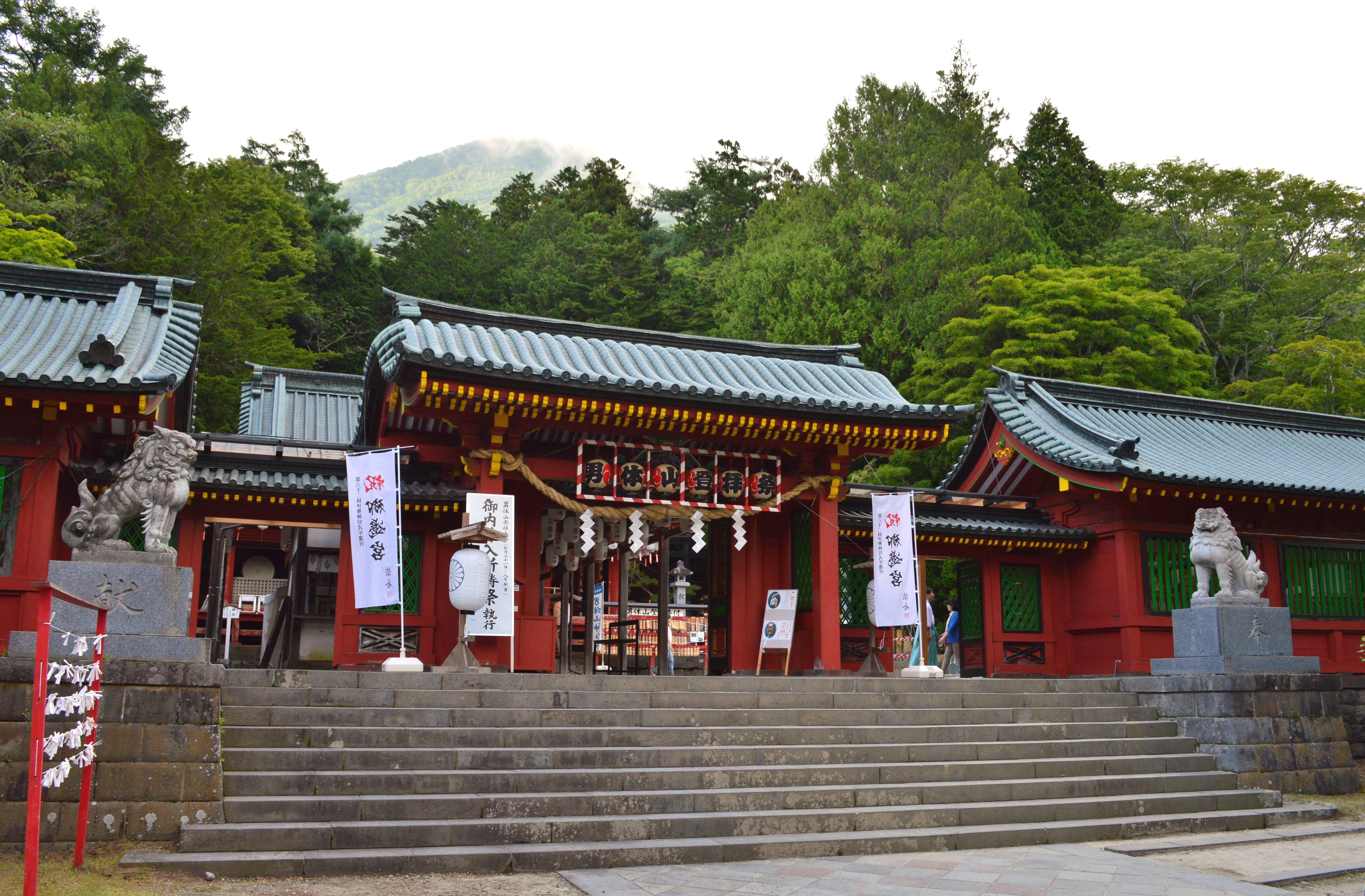 日光二荒山神社 中宮祠 中門